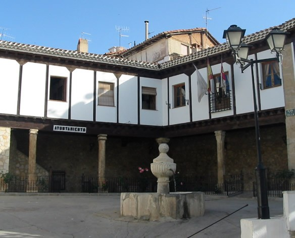 Ayuntamiento de Mira